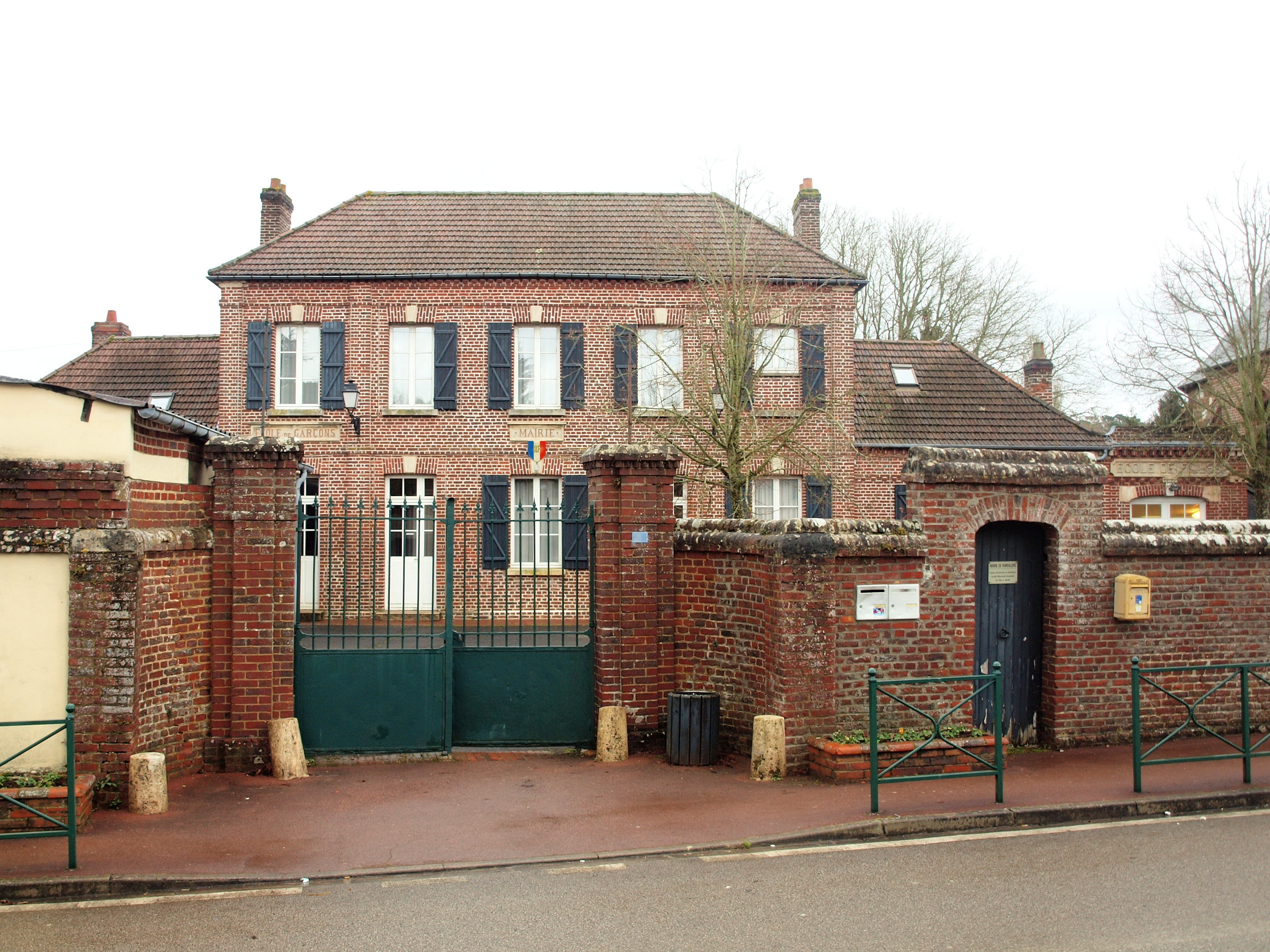 Rainvillers (Oise, France)